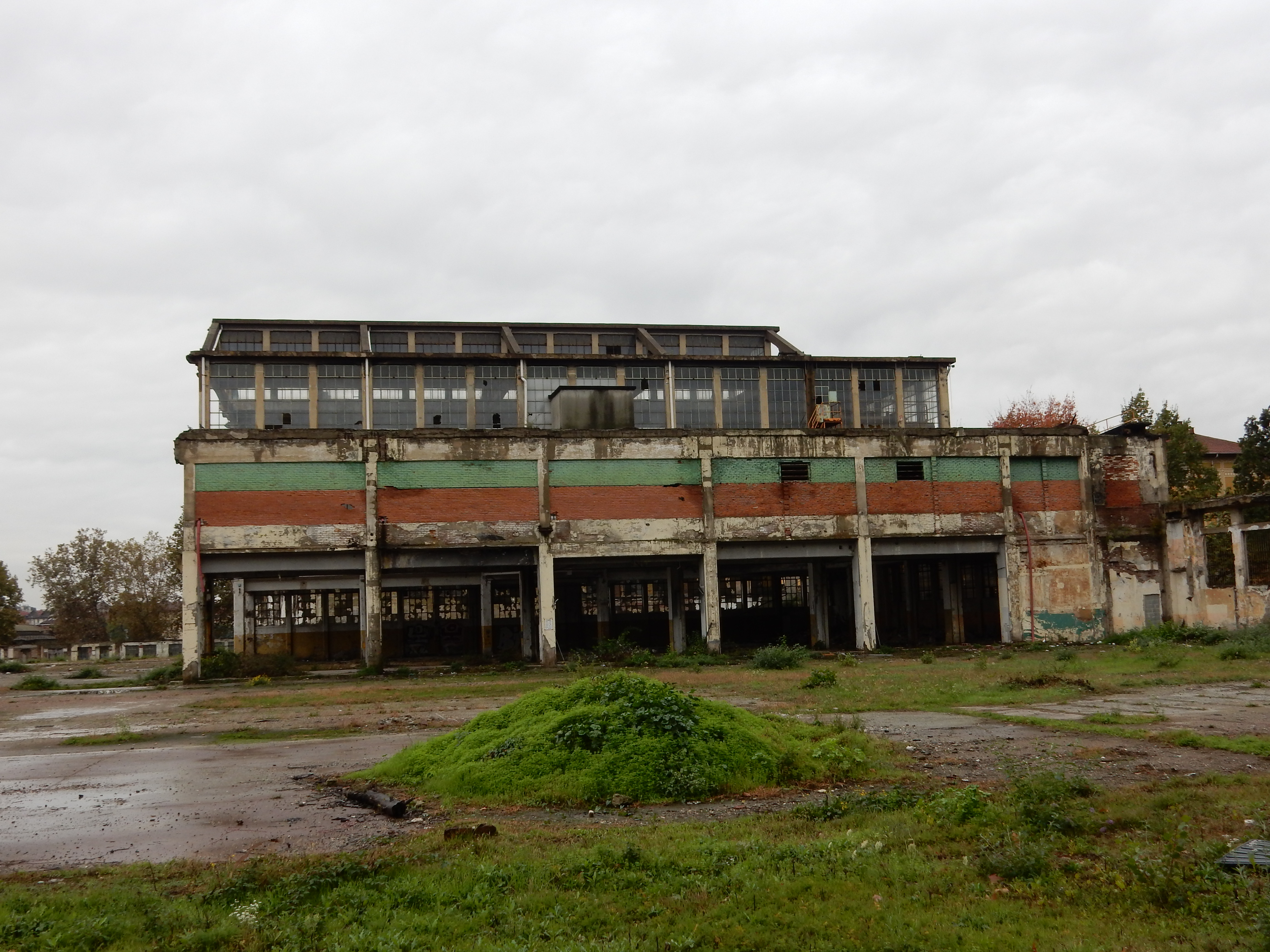 Stato dell'area ex Officine Grandi Motori (2018)